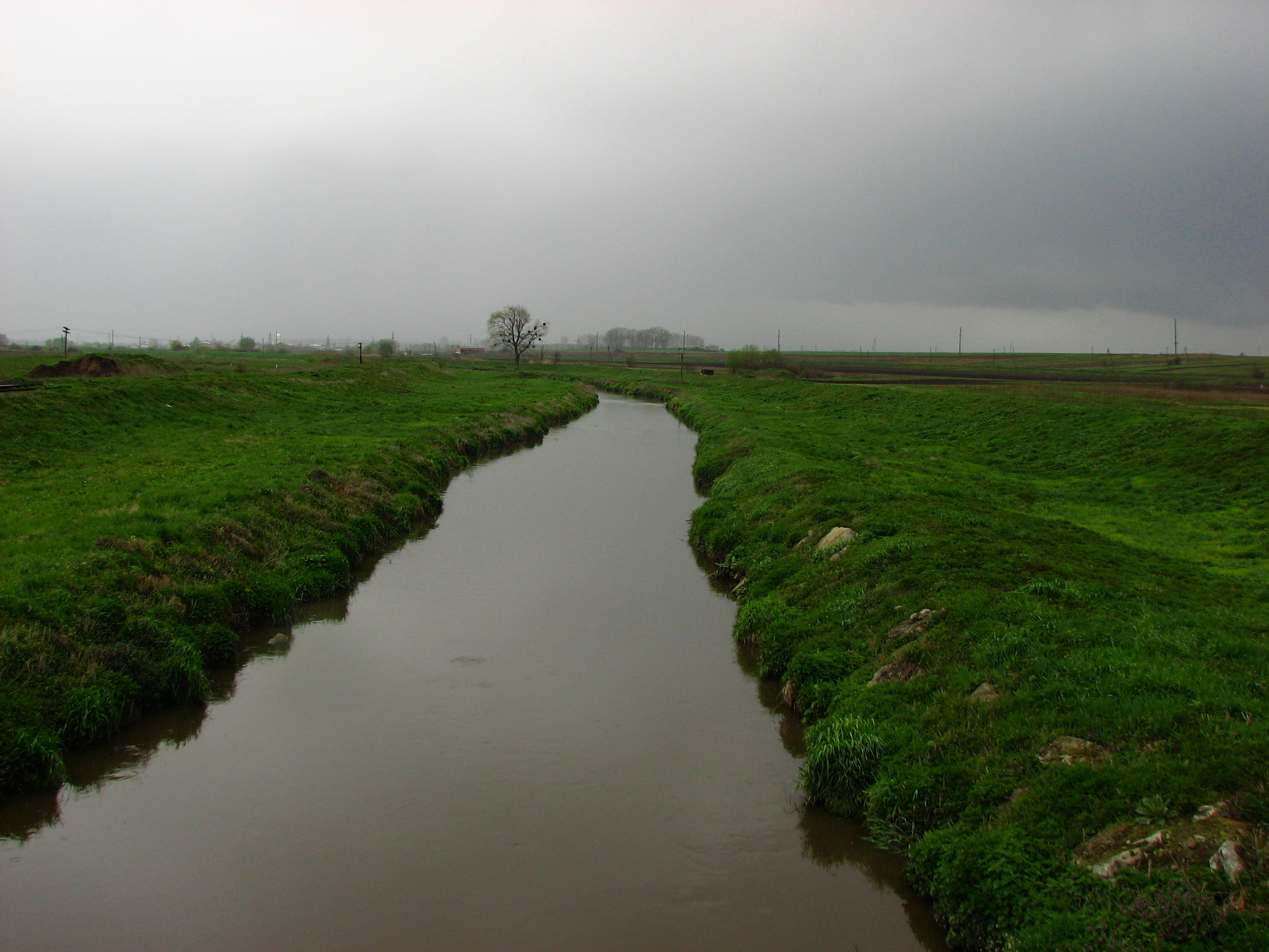 р. Полтва.